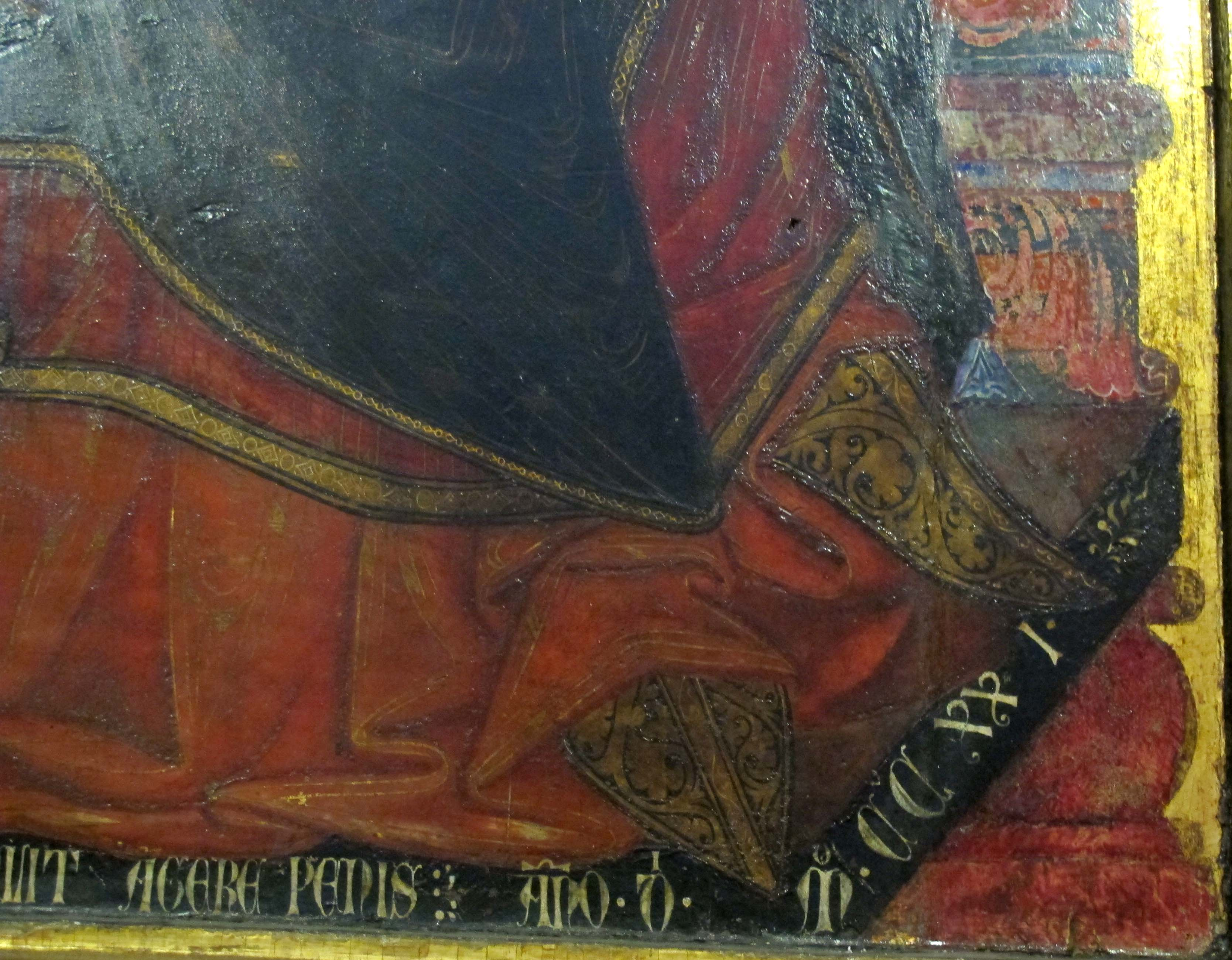 San Domenico, Siena